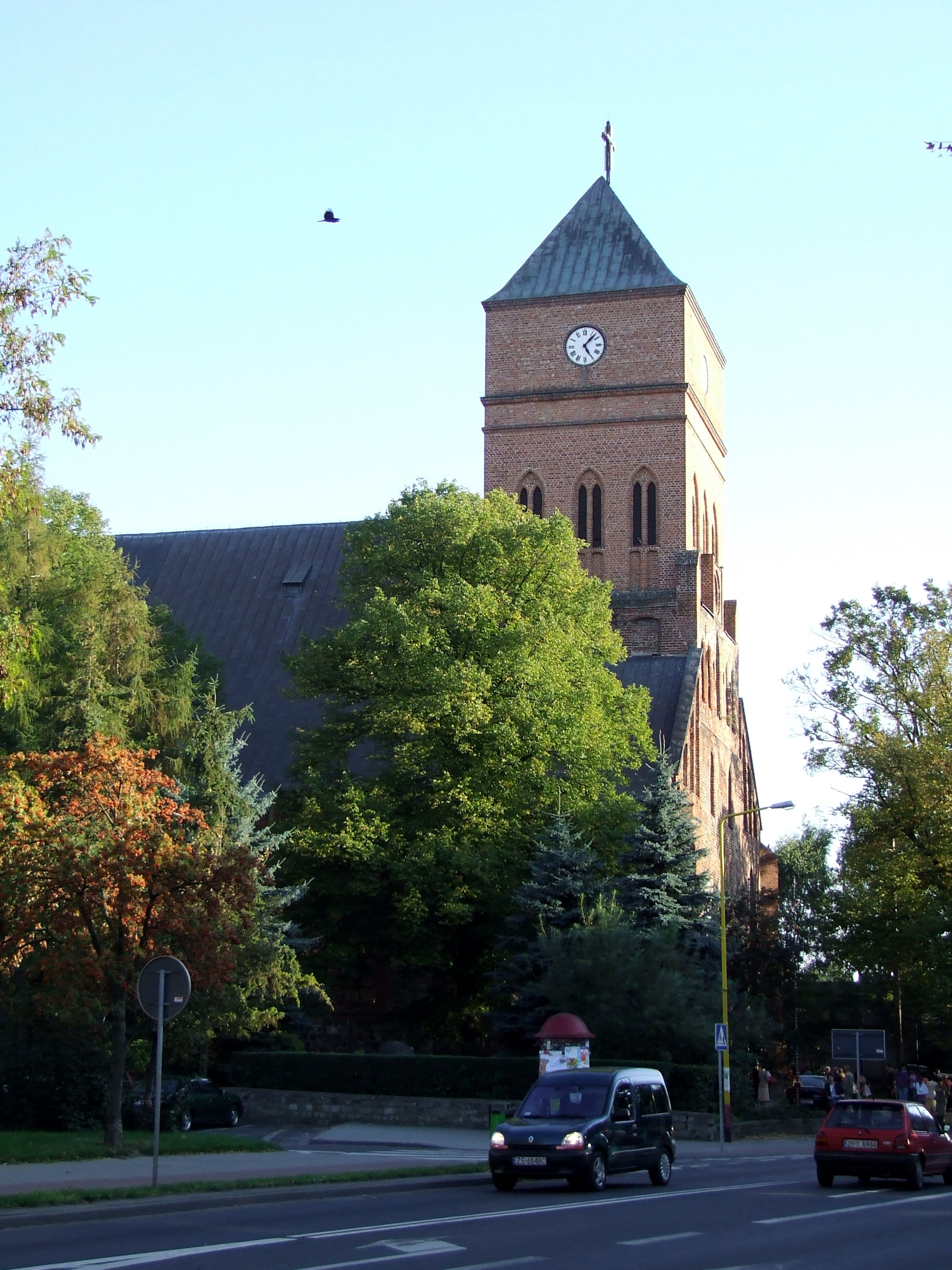 Kościół p.w. Wniebowzięcia Najświętszej Marii Panny w Pyrzycach